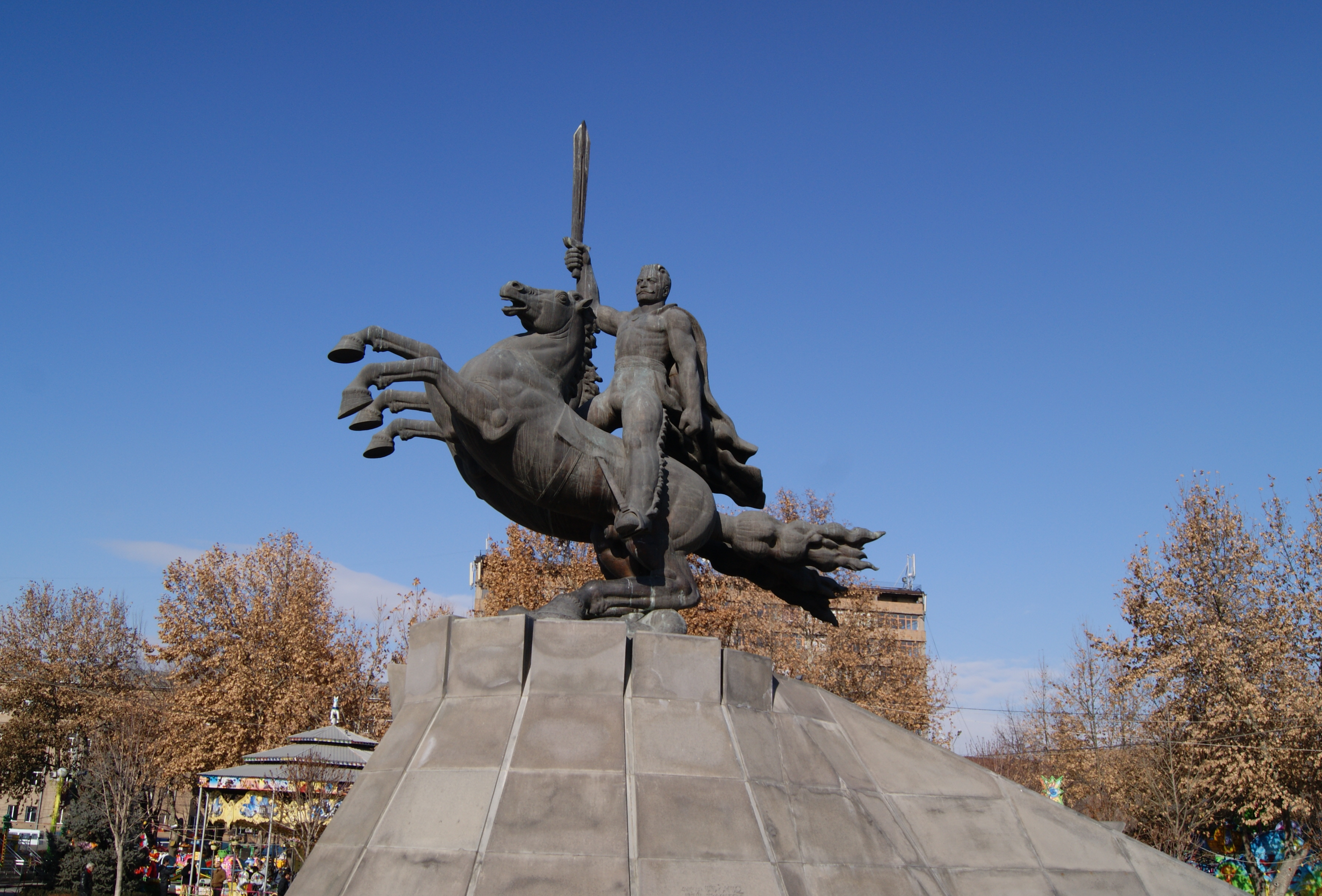 Andranik statue, Yerevan